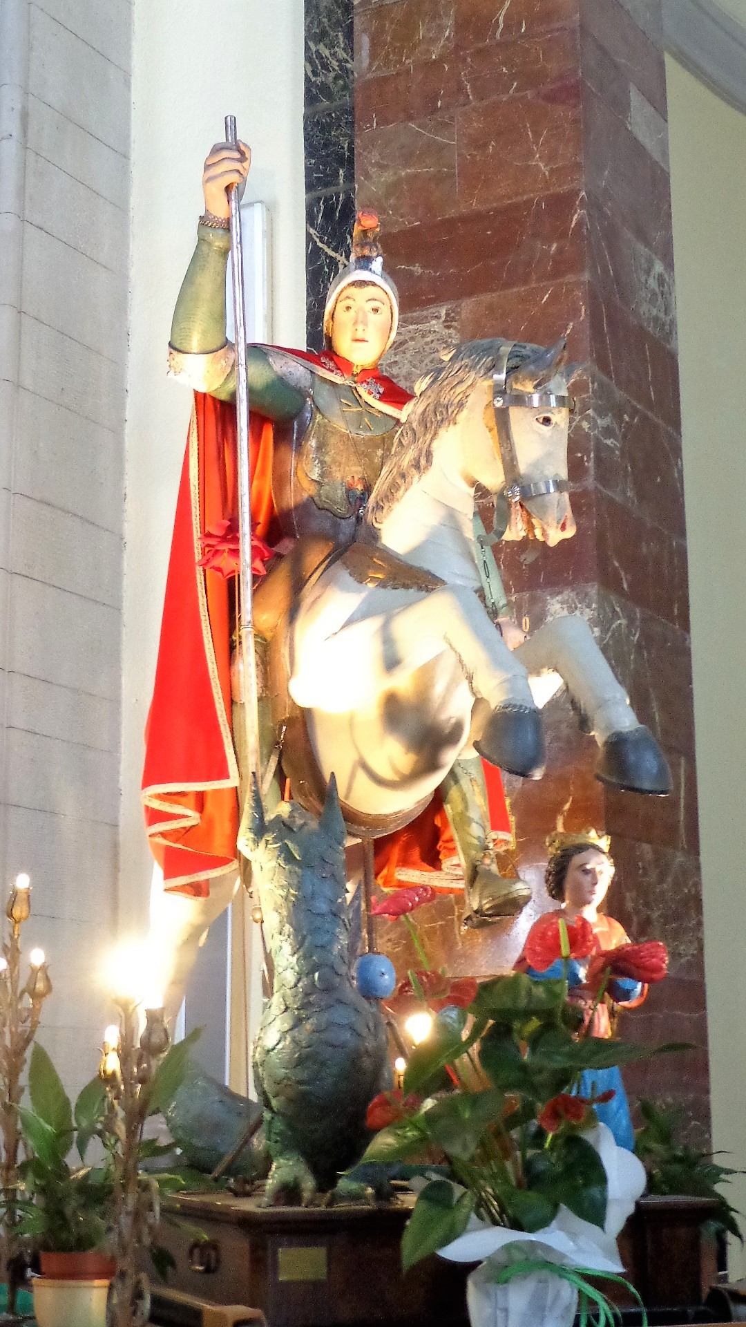 Statua raffigurante San Giorgio a cavallo.